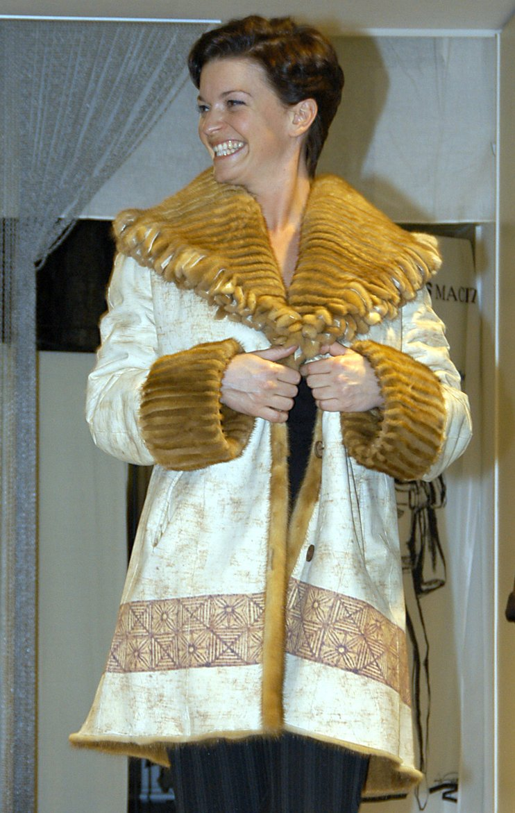 Modenschau der Firma Pelzmodelle Kuhn, Düsseldorf. Anlässlich des hundertjährigen Firmenjubiläums. Goldnerzjacke, wendbar, Lederseite bedruckt (Design Manetti, Italien)